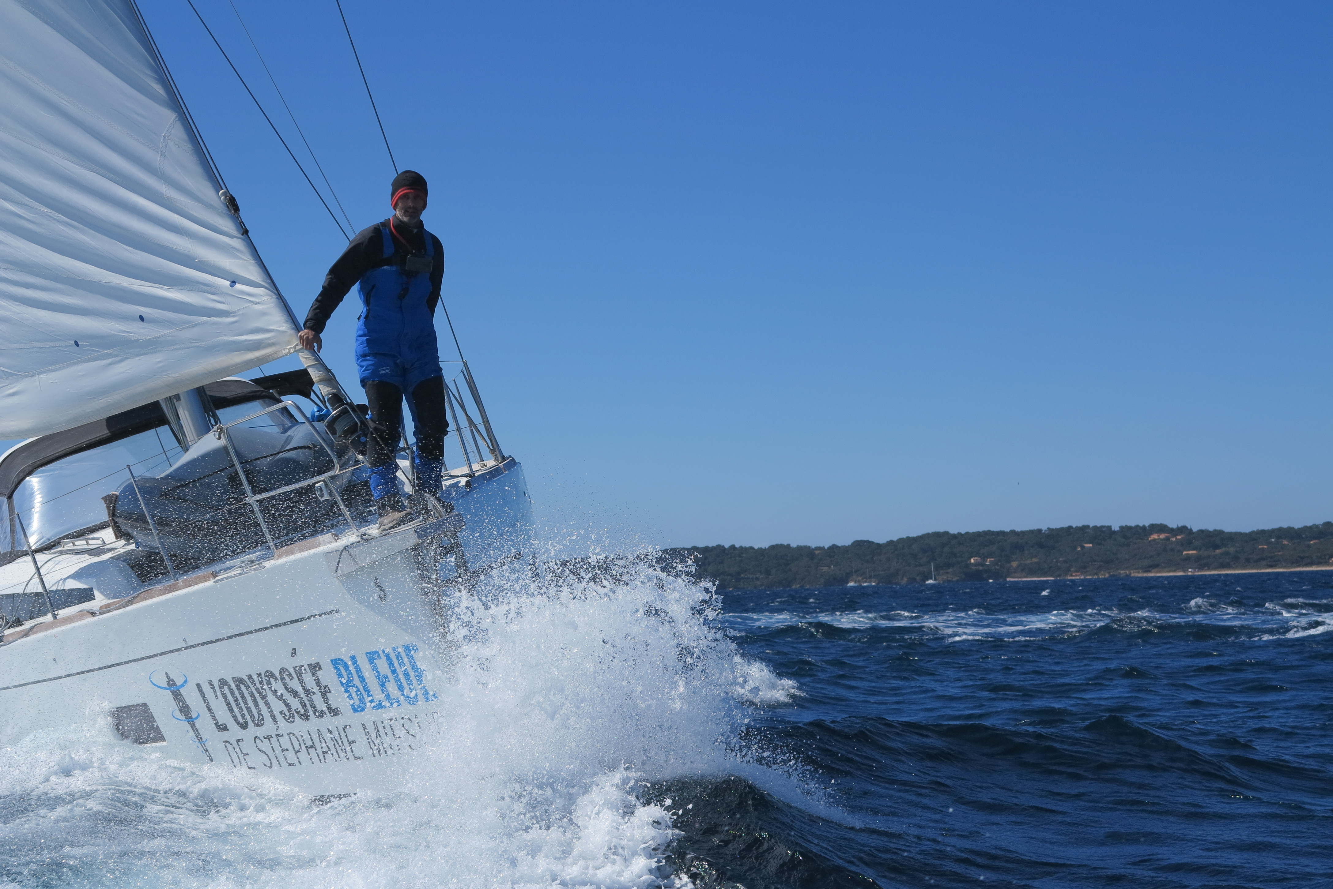 Stéphane Mifsud en train de naviguer en solitaire sur son bateau 11-35 EXPLORER à la proue de son voilier.